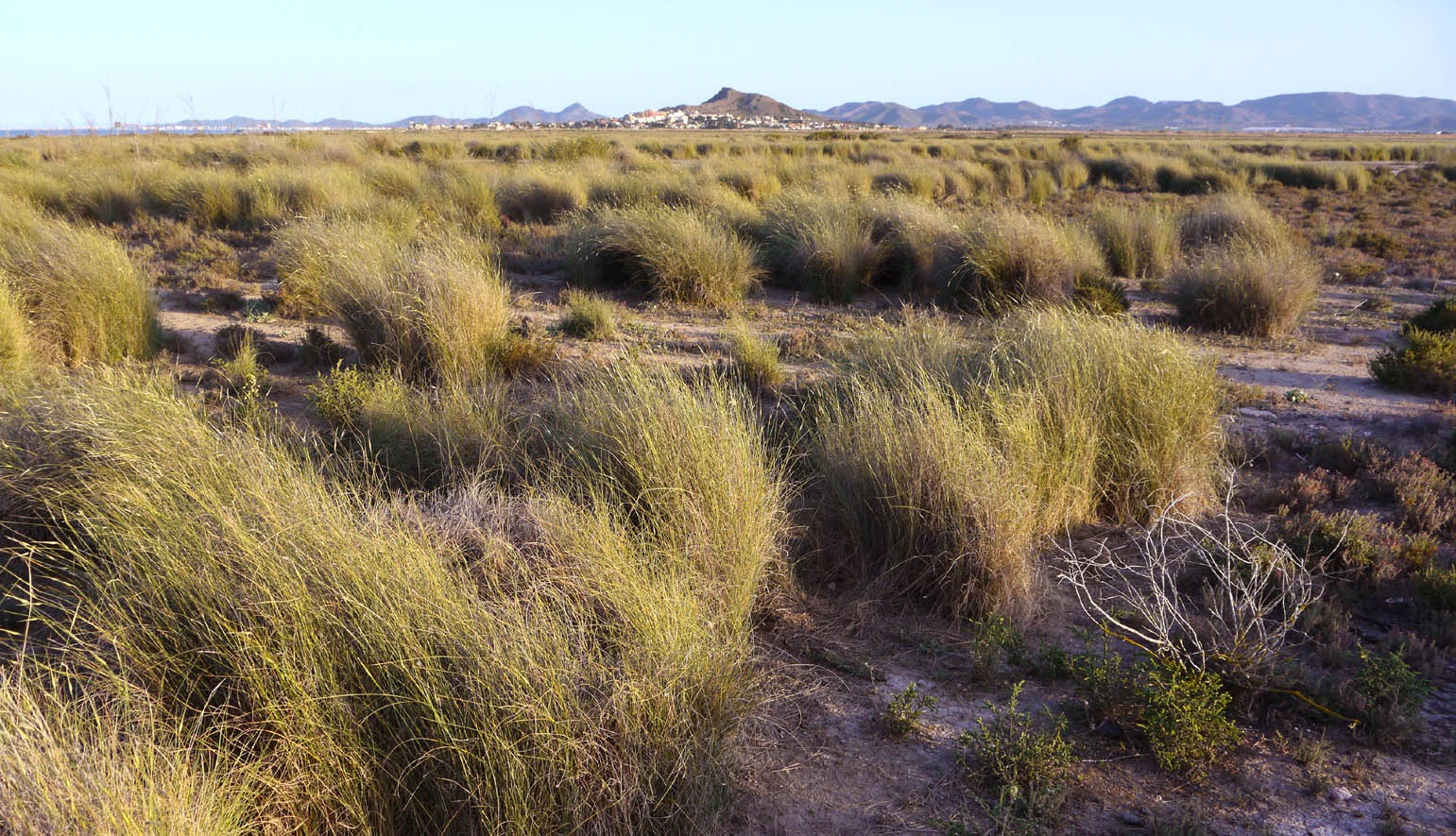 Albardinales (Lygeum spartum) en la marina del Carmolí en el entorno del Mar Menor. Cartagena. España.